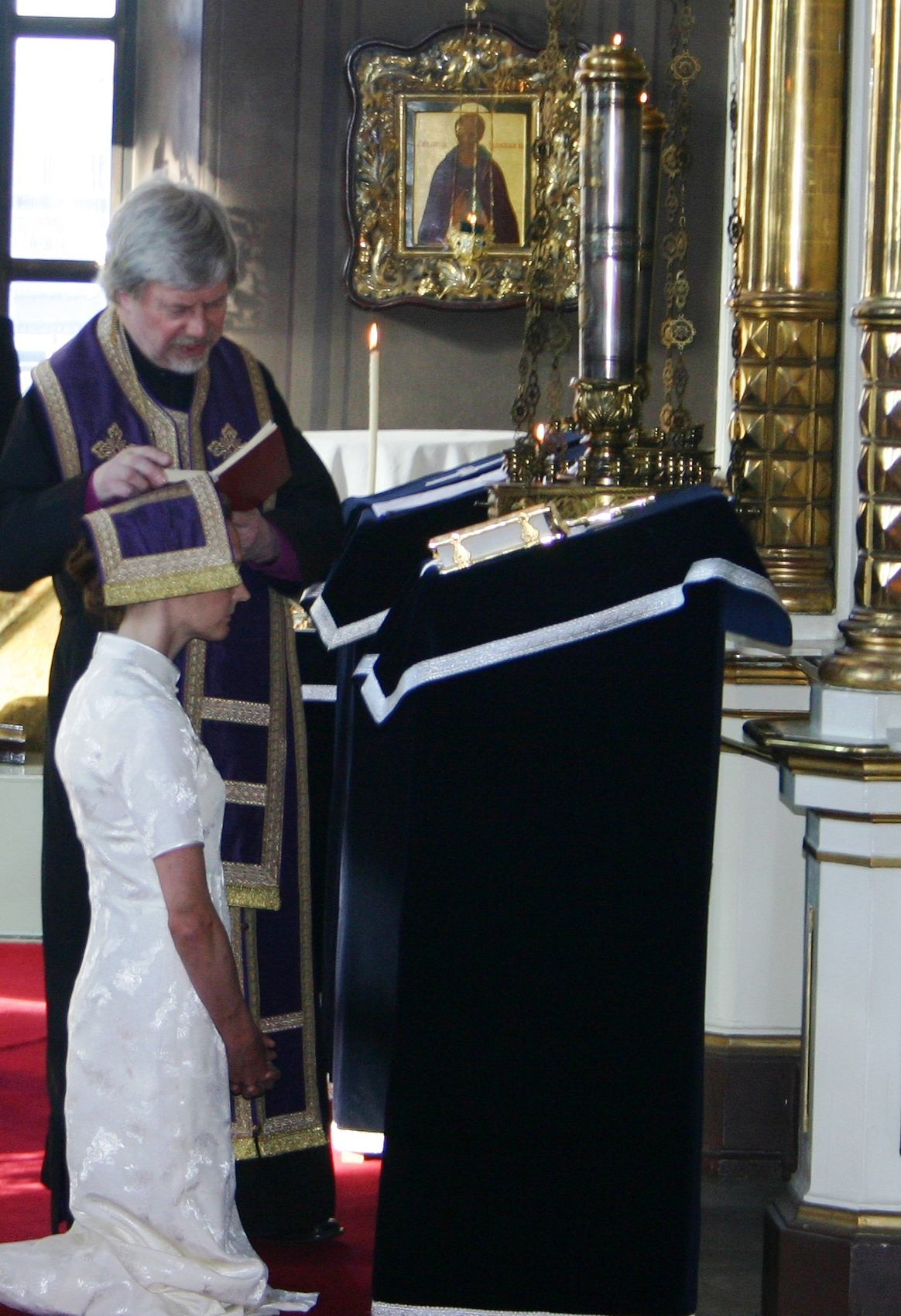 Ripin synninpäästöosa